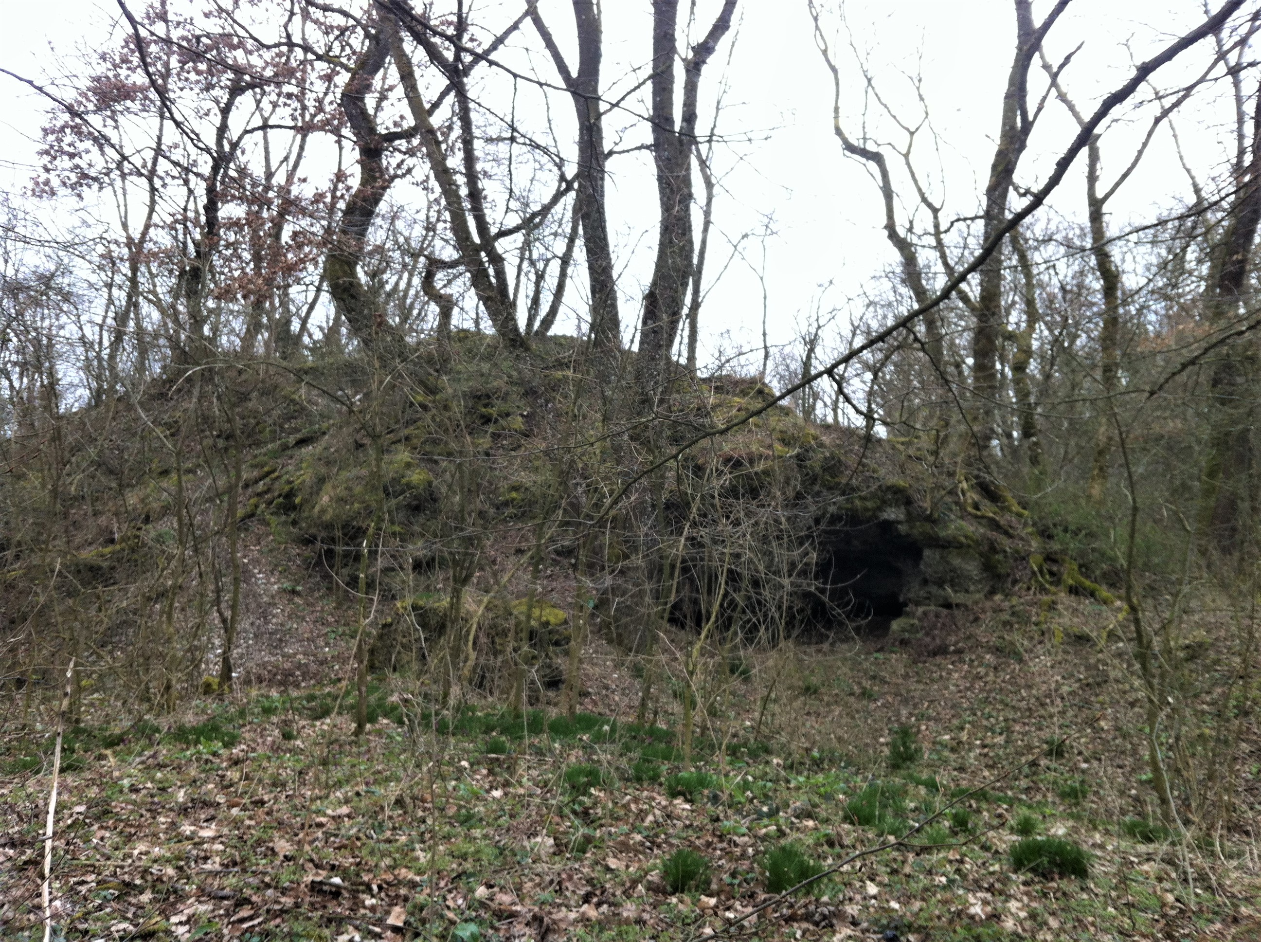 Der Galgenbuck östlich von Oberlauchringen, Gemeinde Lauchringen im Landkreis Waldshut in Baden-Württemberg. Mittelalterliche Hinrichtungsstätte. Mittlere Felspartie aus Nagelfluh.